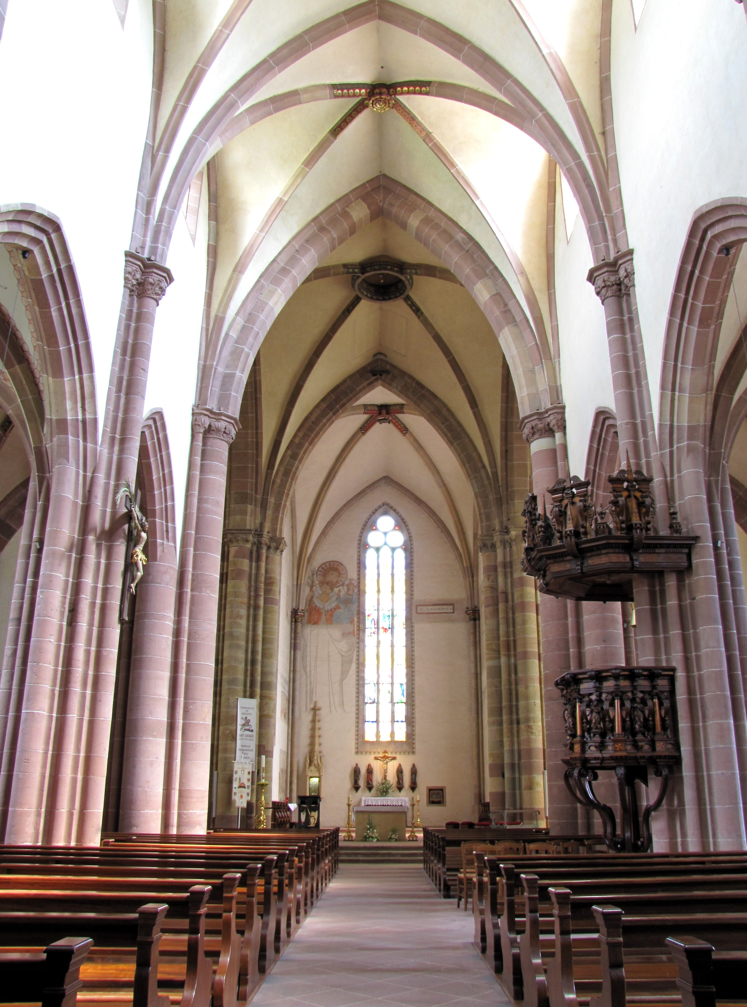 Alsace, Église Saint-Maurice de Soultz-Haut-Rhin (PA00085681, IA00111946): Vue intérieure de la nef.